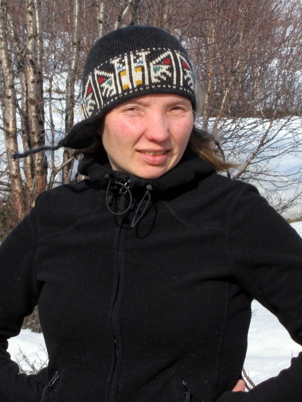 Forfatter og artist Siri Broch Johansen